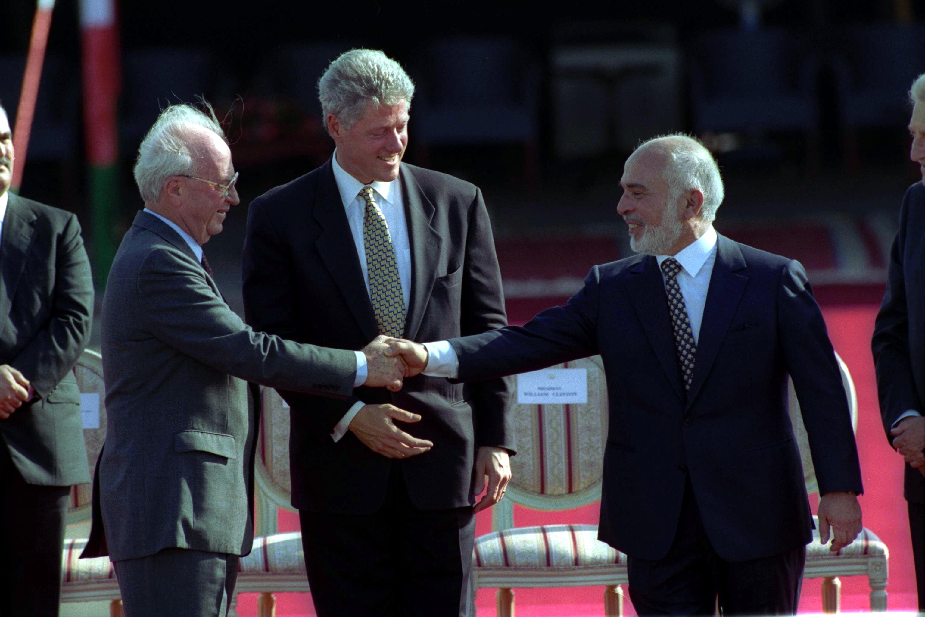 PM YITZHAK RABIN AND KING HUSSEIN SHAKING HANDS AFTER THE SIGNING OF THE ISRAEL-JORDAN PEACE TREATY לחיצת הידיים בין רהמ יצחק רבין וחוסיין מלך ירדן לאחר החתימה על הסכם השלום בין ישראל וירדן